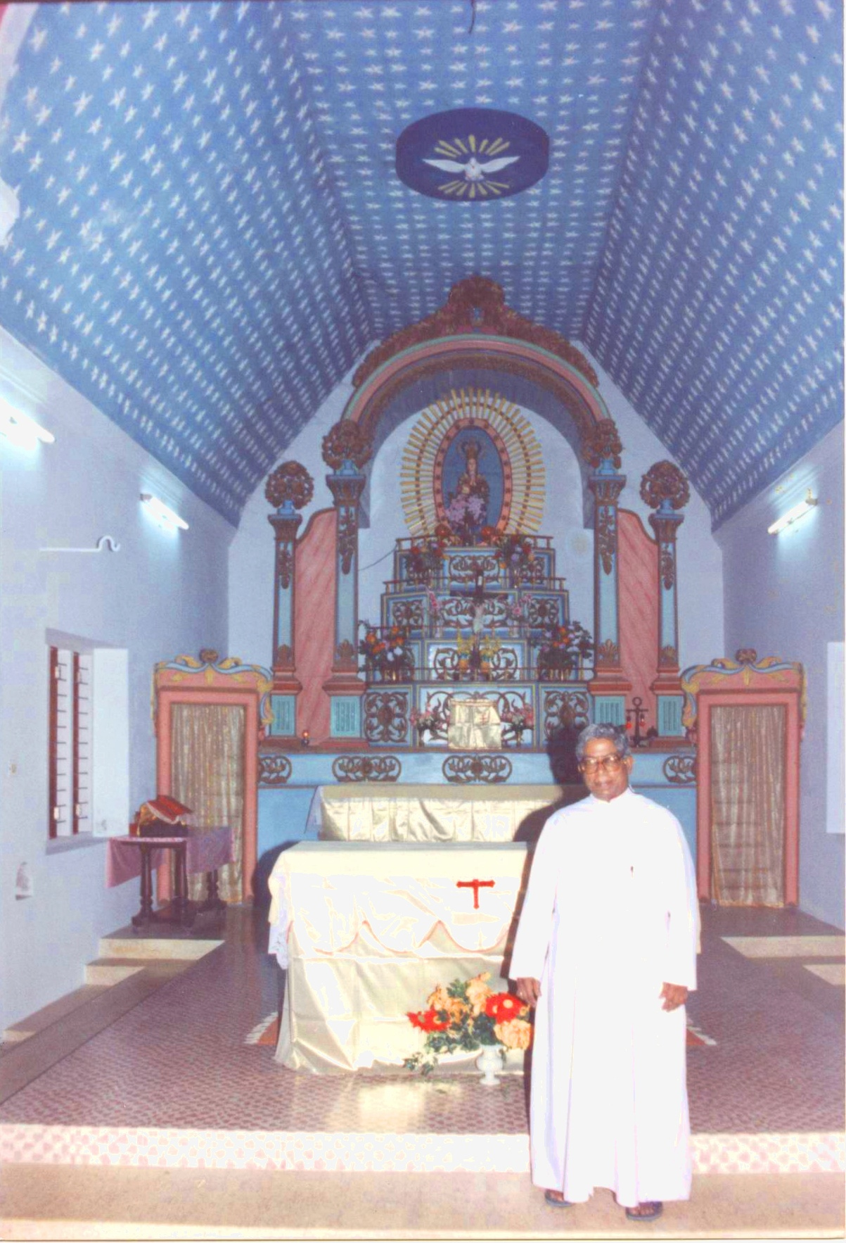 Quilon, Kerala, Indien, Bischofskapelle innen, mit Bischof Joseph Fernandez, 1998